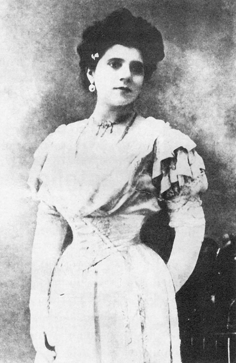 Dina Barberini (Brigida Barborini): Italian opera singer (soprano)